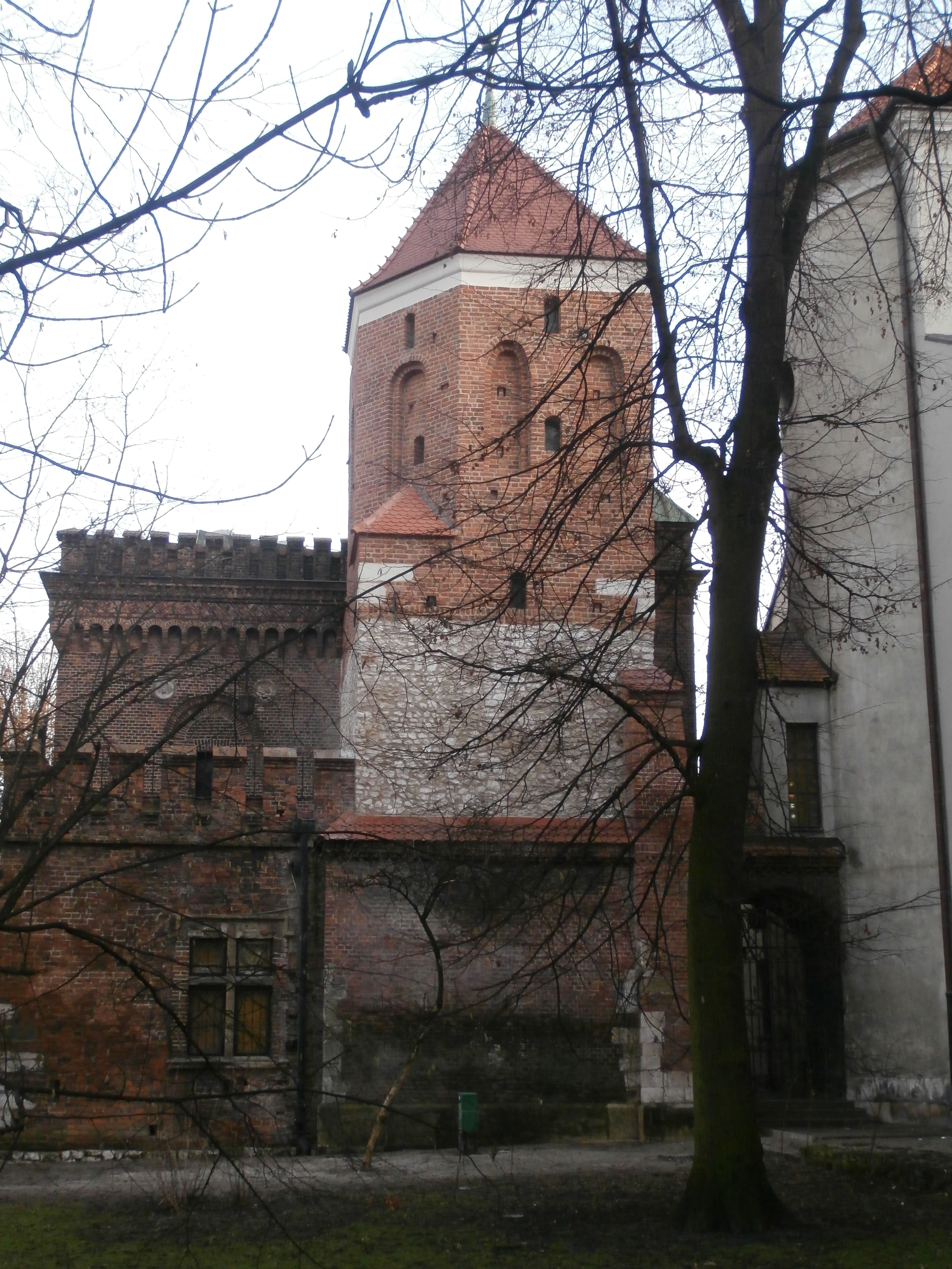 Baszta Cieśli w Krakowie. Po remoncie, 2015.